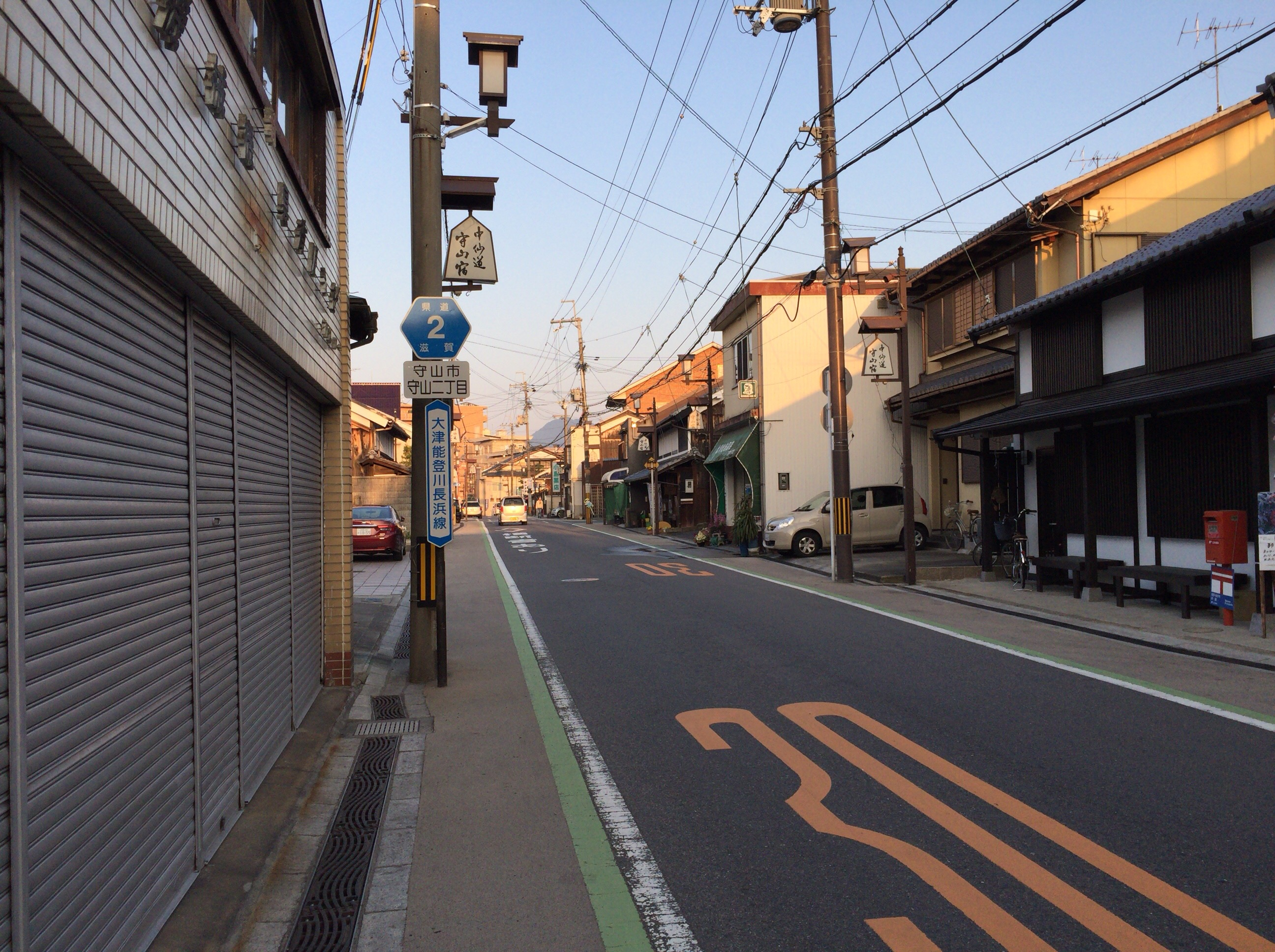 滋賀県道2号大津能登川長浜線のja:守山市守山二丁目付近。またja:中山道でもある。